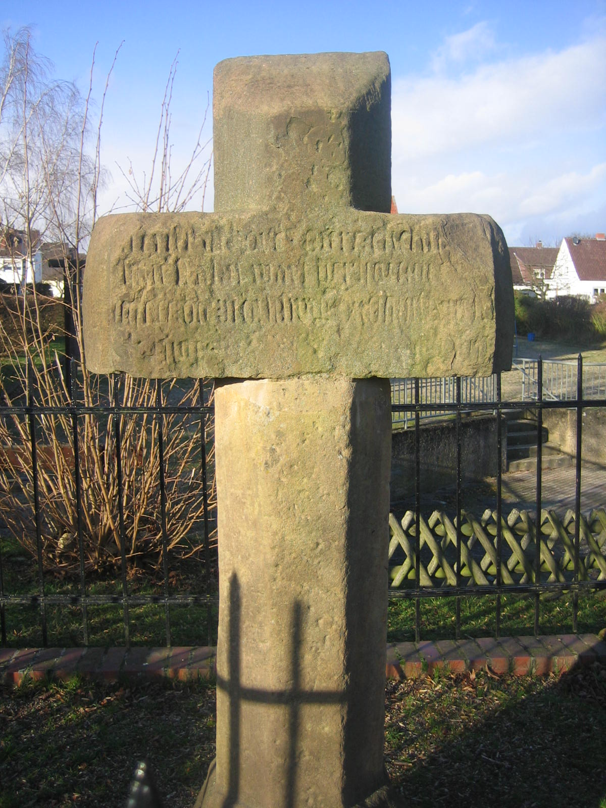 Kaiserkreuz